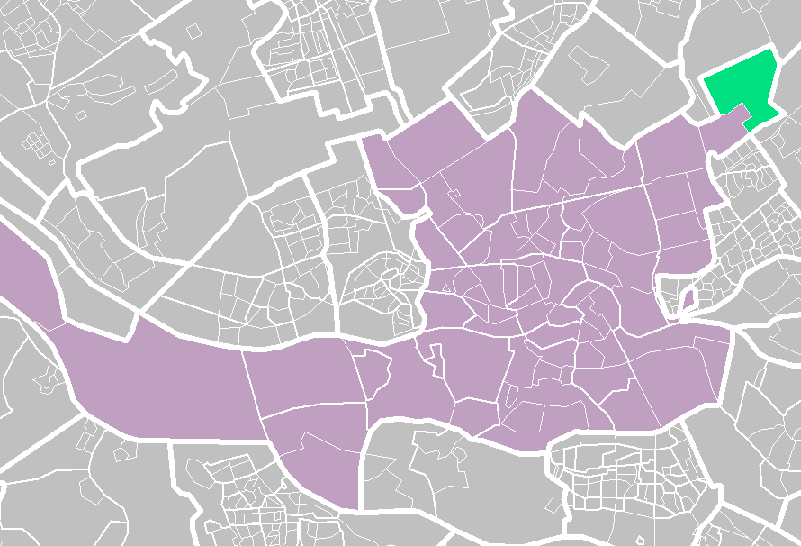 Rotterdam districts/neighboorhoods